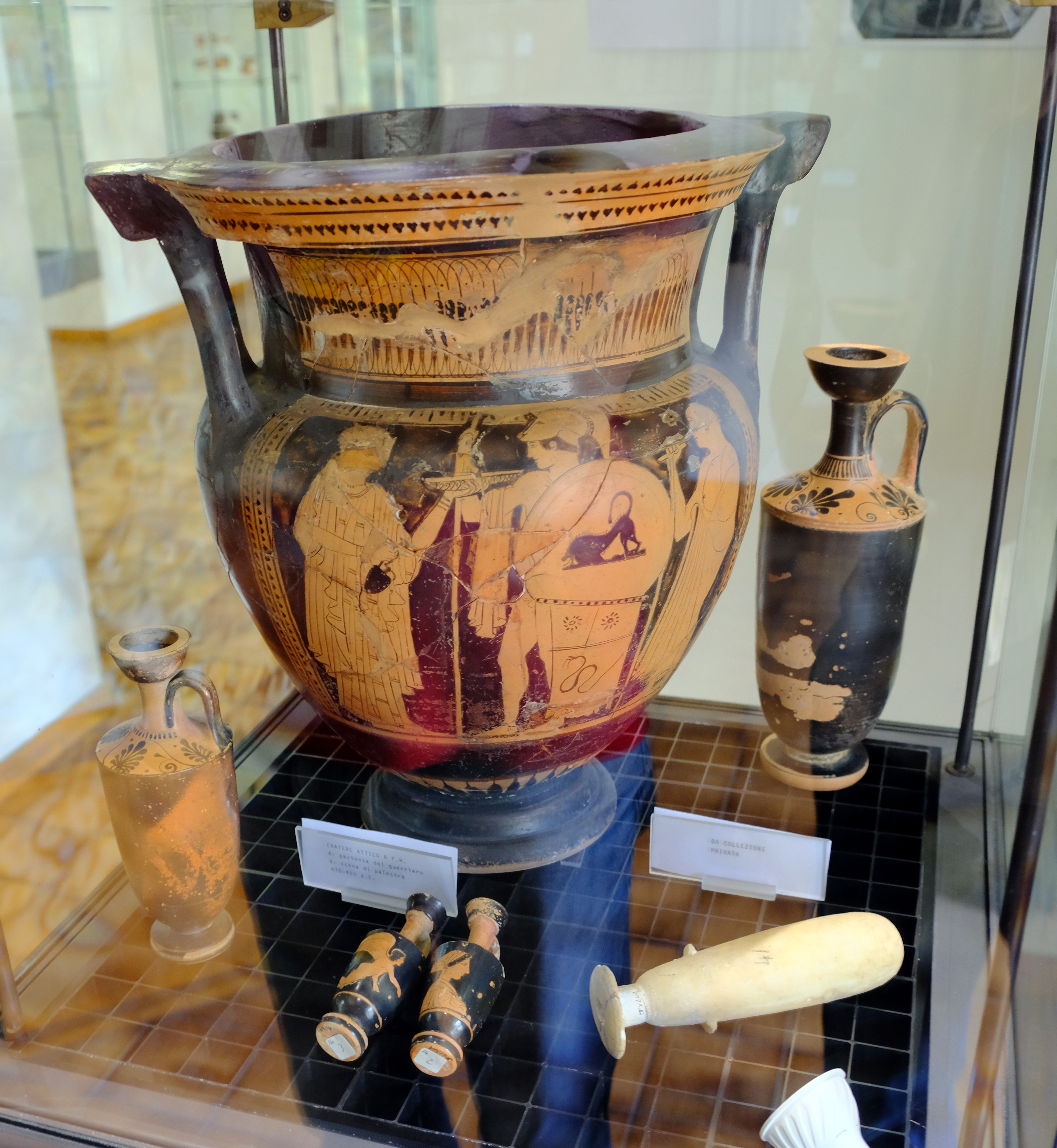 Reperti dell'area di Enna